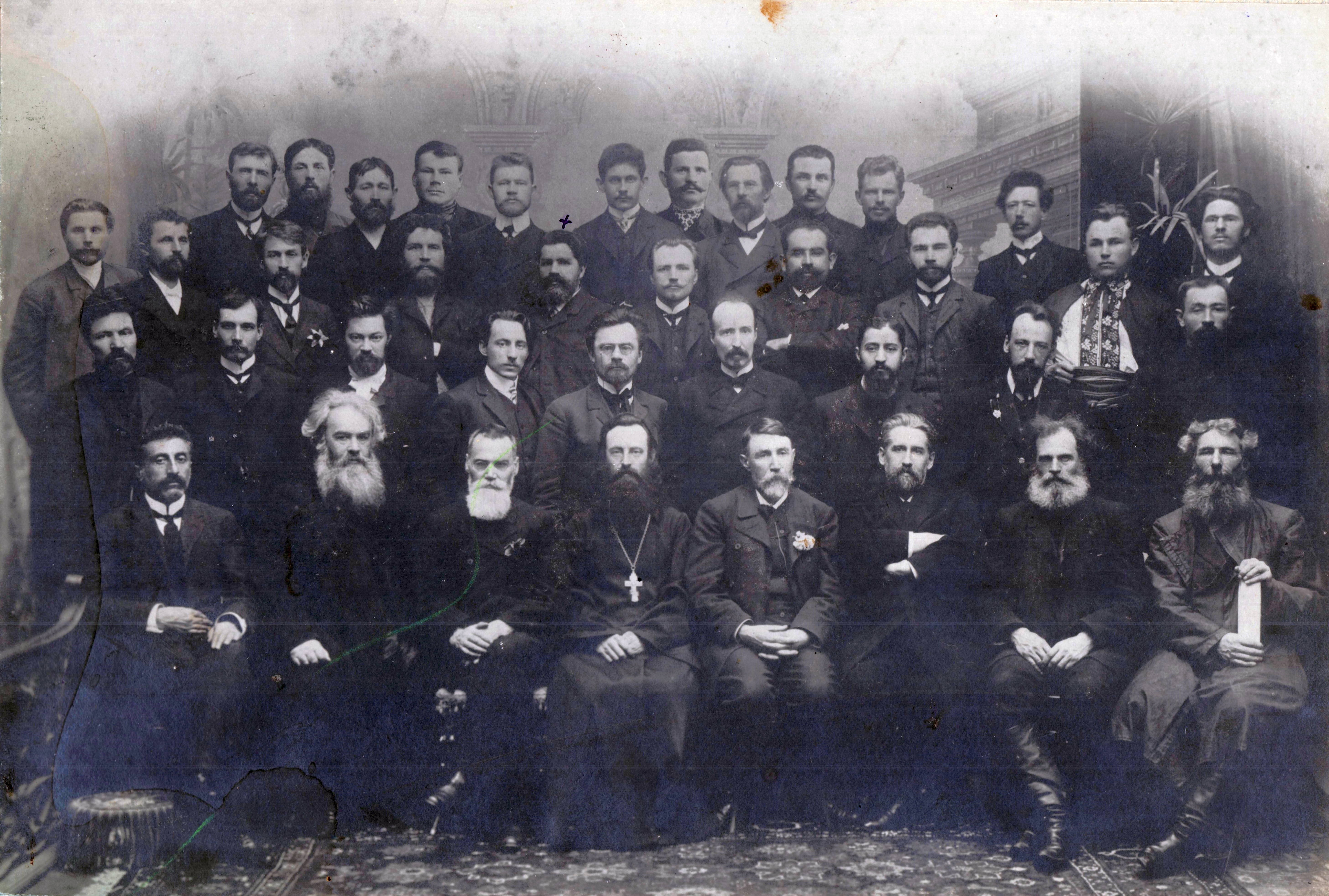 Группа эсеров, членов II Государственной думы Российской империи. Первый (передний) ряд (слева направо) И. Я. Сагателян Н. И. Емельянов А. П. Козлов о. А. И. Бриллиантов Н. И. Долгополов В. П. Успенский Н. О. Оводов Н. С. Кирносов Второй ряд И. Е. Пьяных А. И. Русанов М. Г. Зайцев Н. С. Долгополов 2-й В. Г. Архангельский П. С. Ширский С. Ф. Тигранян Г. А. Горбунов П. С. Лохвицкий Третий ряд И. П. Хворостухин Д. Л. Зимин В. В. Евреинов М.С. Фокеев П. С. Сигов (отмечен крестиком) Ф.И. Ржехин С.Х. Тер-Аветикянц И. Н. Мушенко В. И. Хвост Четвёртый (задний) ряд И.Л. Финеев И.А. Наумов П.С. Мороз Л.А. Ефремов В.С. Абрамов А.П. Друкарь Ф.Г. Литвиненко И.А. Лебедев А.Ф. Кузнецов В.И. Толмачевский В.М. Стрелков Г. К. Покровский